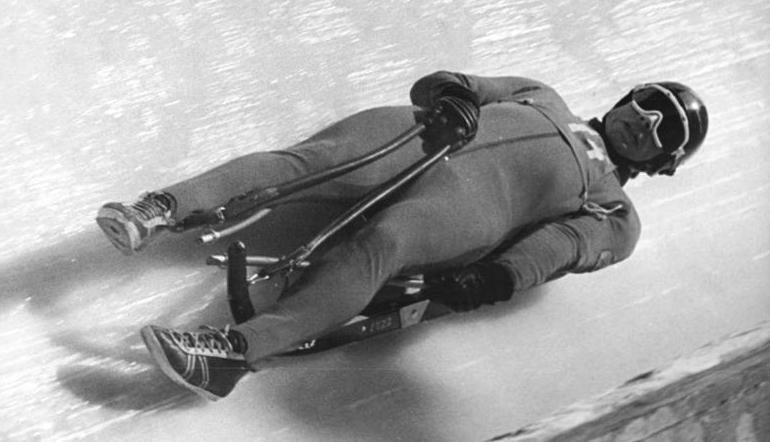 Wolfram Fiedler ADN-ZB Demme 17.1.1972 Königssee: Europameisterschaften im Rennschlittensport-auch Herren-Titel an DDR-Bei den Herren feierte die DDR sogar einen Doppelerfolg. Spitzenreiter Wolfram Fiedler (SC Traktor Oberwiesenthal-Foto von einem früheren Wettkampf) verteidigte seine Führung am 17.1.1972 auf der Kunsteisbahn in Königssee im letzten Lauf und verwies in 2:58,75 min Harald Ehrig (2:58,81) auf den zweiten Rang.